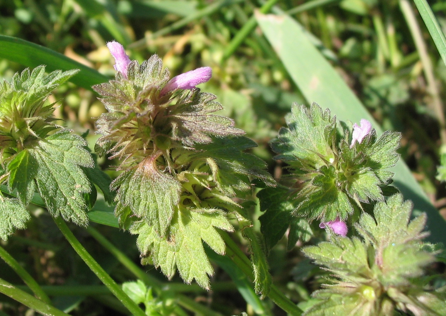 Description: Lamium hybridum Photo: Alain Jotterand, Lavigny (CH), bordure de champ cultivé, 4.5.2006